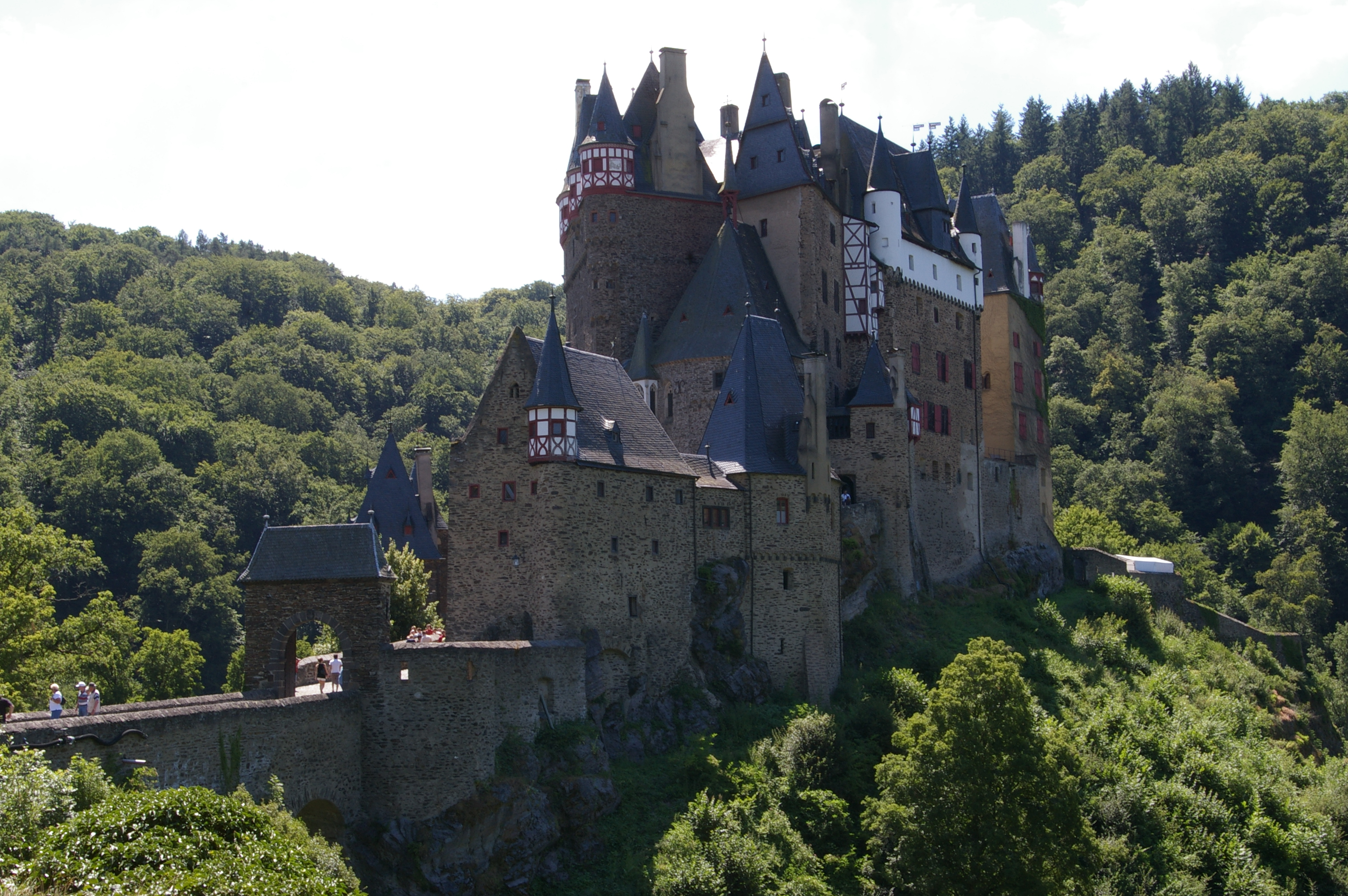 Le château d'Elzt